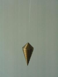 Eigen foto auteur. Zelfgemaakte media, vrijgegeven onder GFDL Foto gemaakt op 7 augustus 2005.